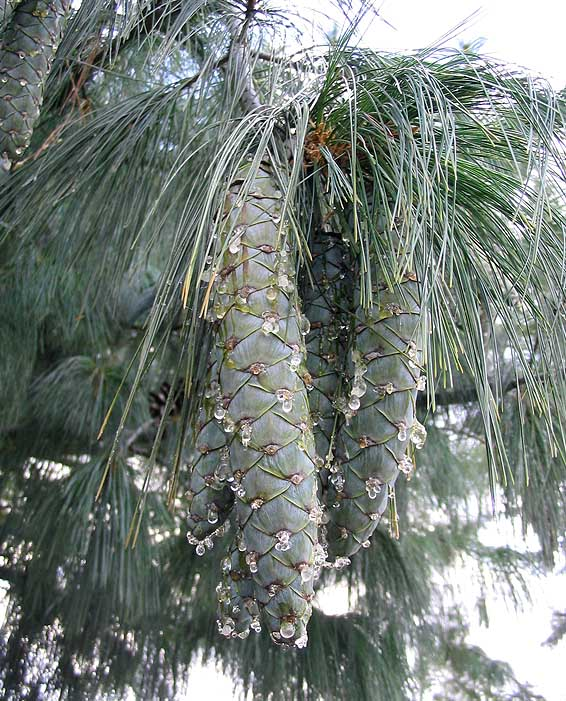 Cônes de pin de l'Himalaya Photo prise à Vernet-les-Bains en octobre 2004 Jean Tosti 10/2004